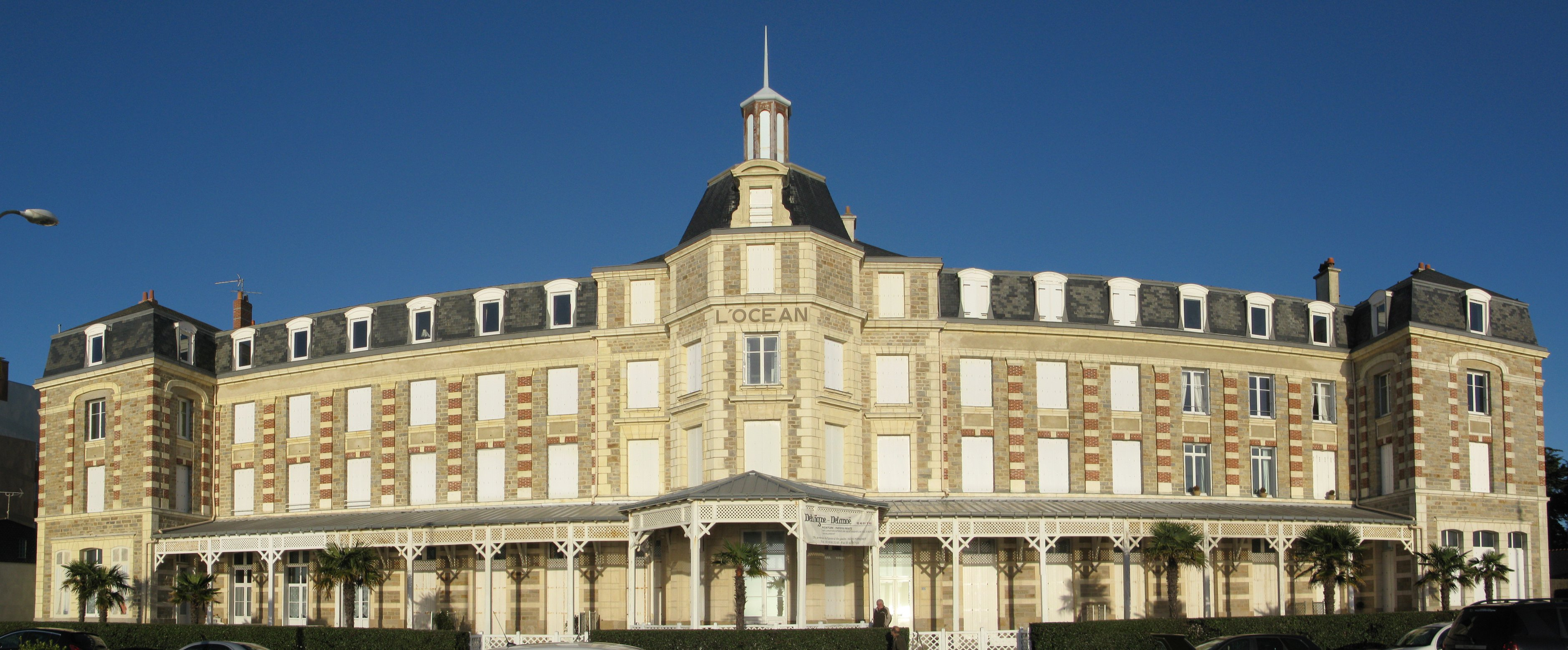 L'hôtel l'océan, sur la côté à Pornichet